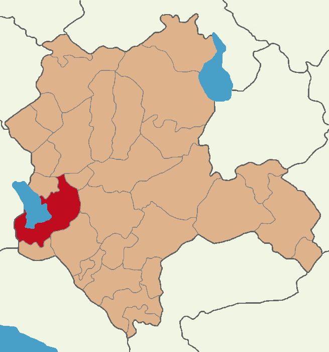 Beyşehir ilçesinin konumu